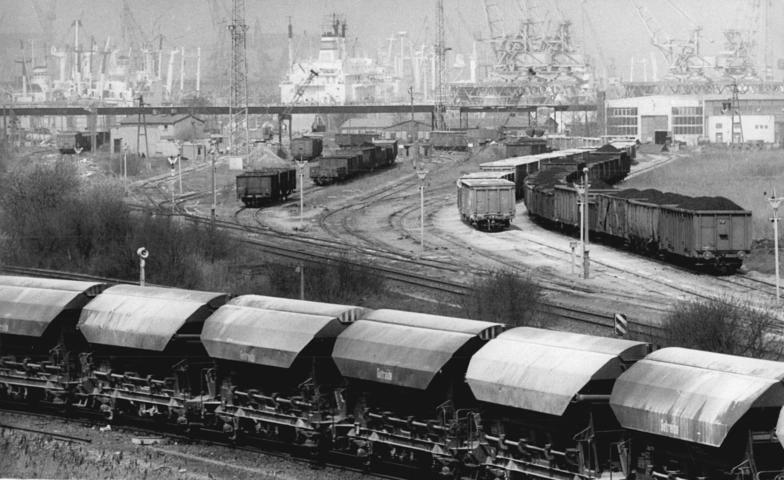 Rostock, Überseehafen, Güterwaggons ADN-ZB Sindermann 14.4.82 Rostock: Per Schiene werden rund 95 Prozent der im Rostocker Überseehafen umgeschlagenen Importgüter transportiert. 48 fahrplanmäßige Verbindungen in das Streckennetz der DDR gibt es vom Bahnhof Rostock Seehafen aus. Wurde 1981 10, 9 Millionen t Güter per Eisenbahn ins Binnenland transportiert, sollen es 1985 rund 18 Millionen t Ladegut sein. - siehe auch 1982-0414-3, 4N